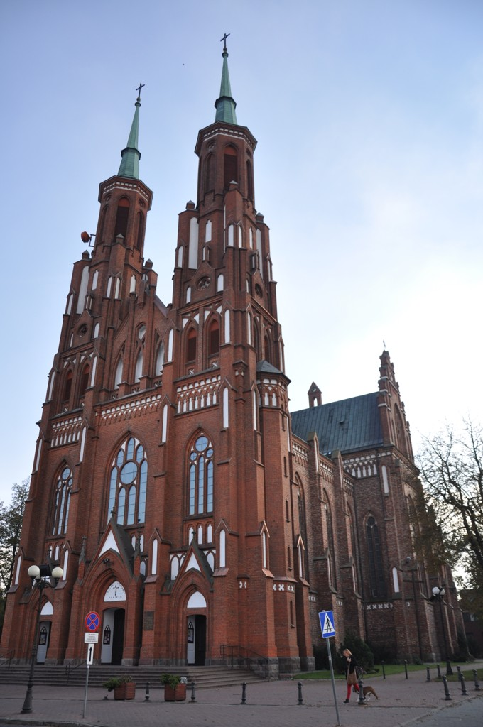 Kochanowskiego 11, 08-110 Siedlce